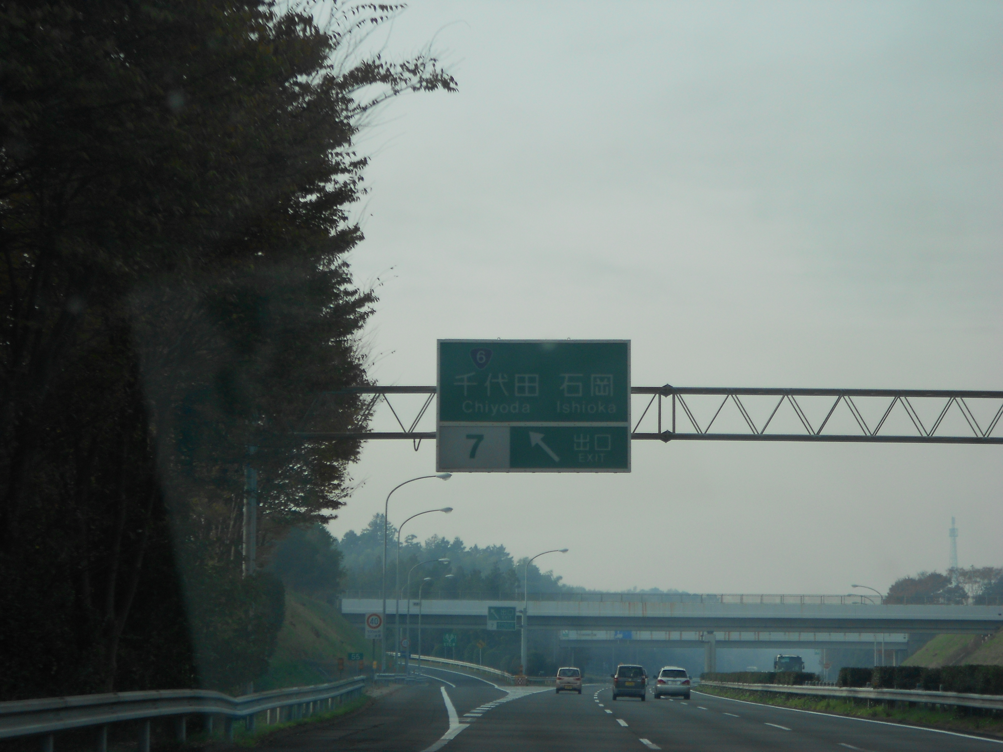 [E6]常磐自動車道の(7)千代田石岡ICの上り出口の標識。2011年11月27日撮影。